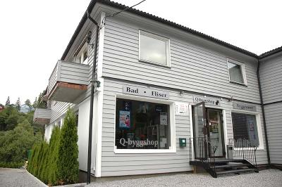 Butikk-bilde